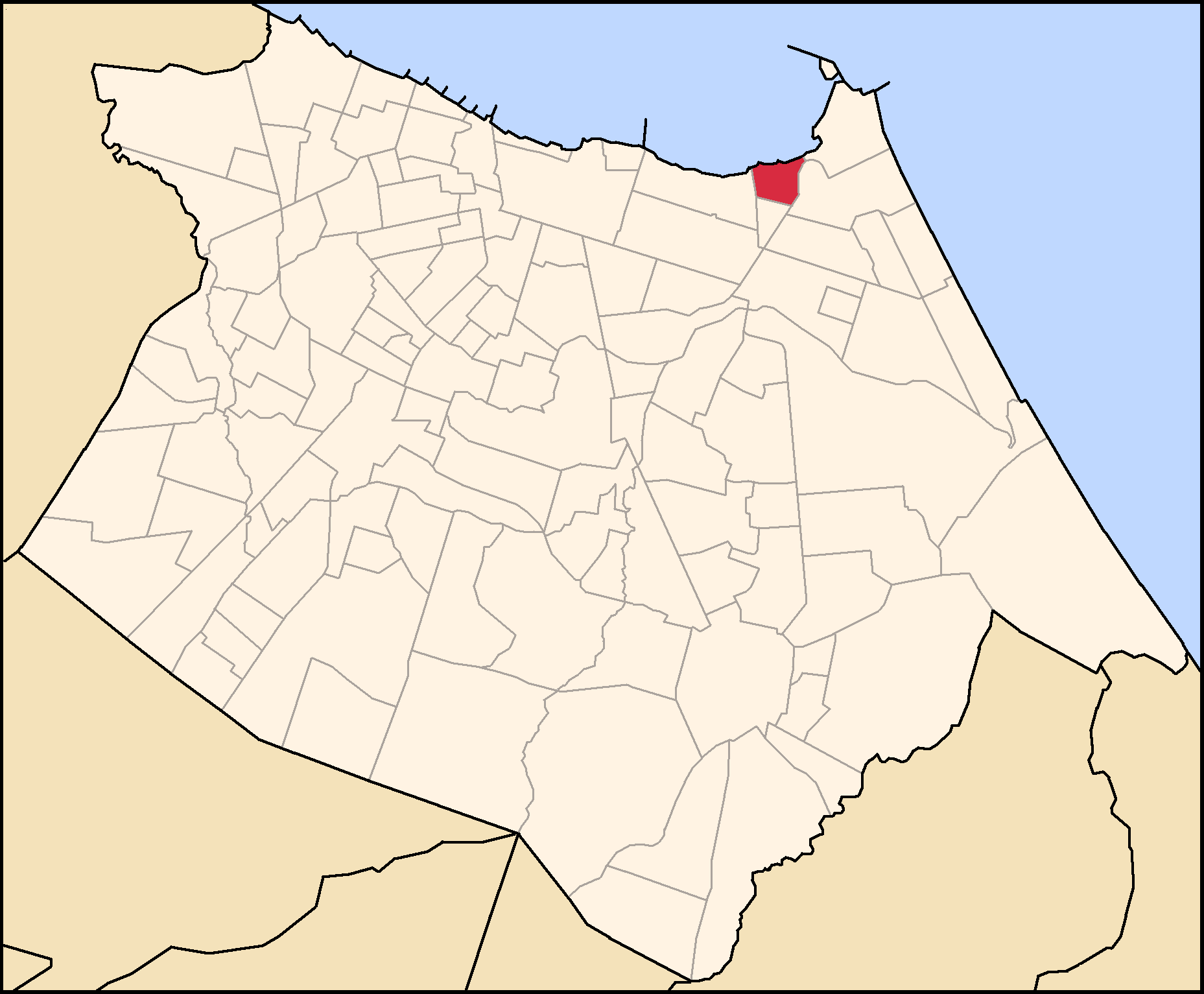 Bairro do Mucuripe, Fortaleza, Ceará, Brasil